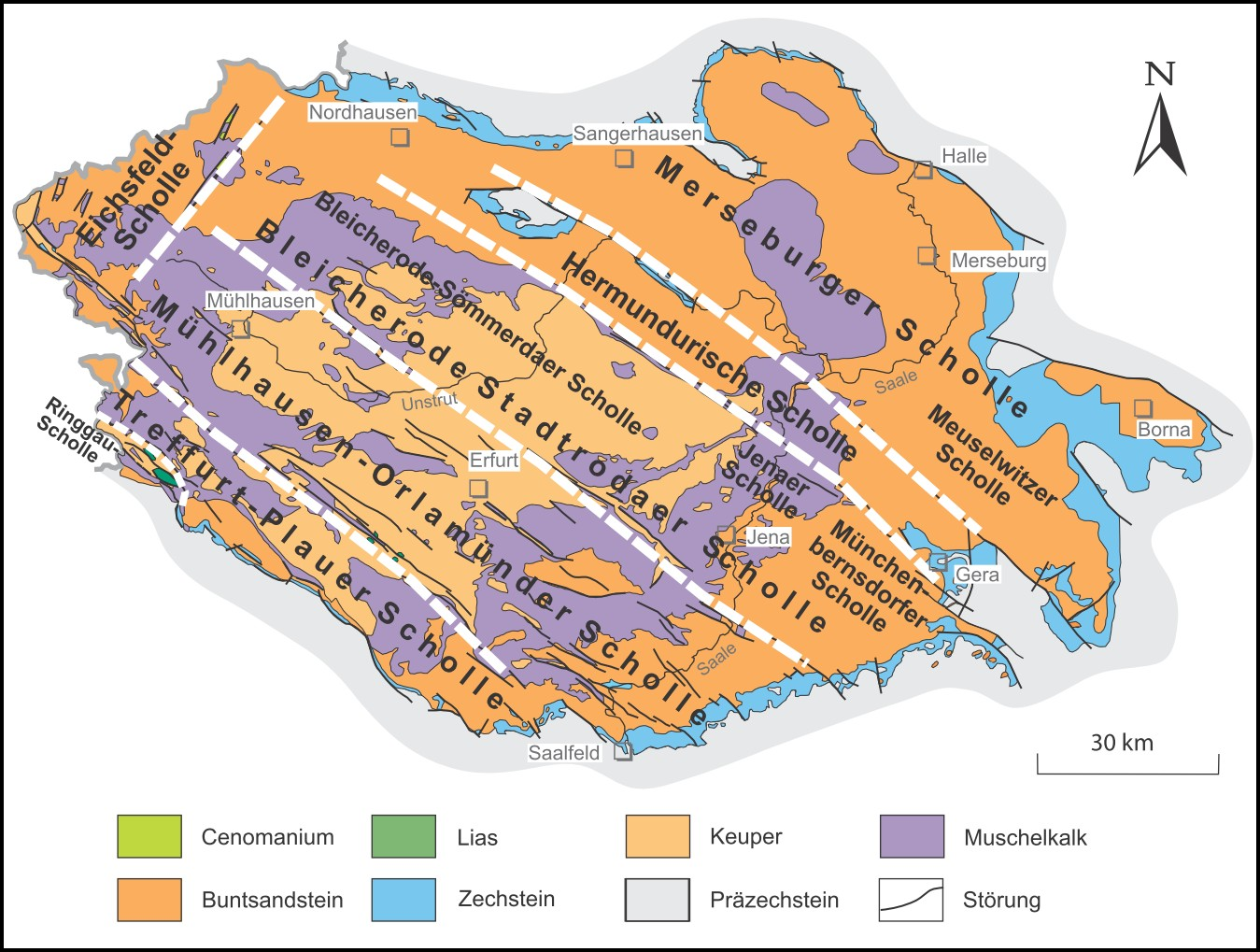 Schollengliederung des Thüringer Beckens sensu lato (Auswahl) Darstellung ohne känozoische Bildungen (nach Geologie-Standard TGL 34331/01 1983; G. KATZUNG & G. EHMKE/Hrsg. 1993; G. SEIDEL 2003, 2004)